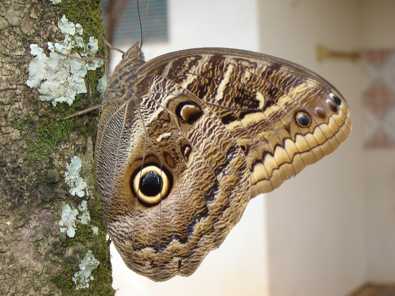 Borboleta